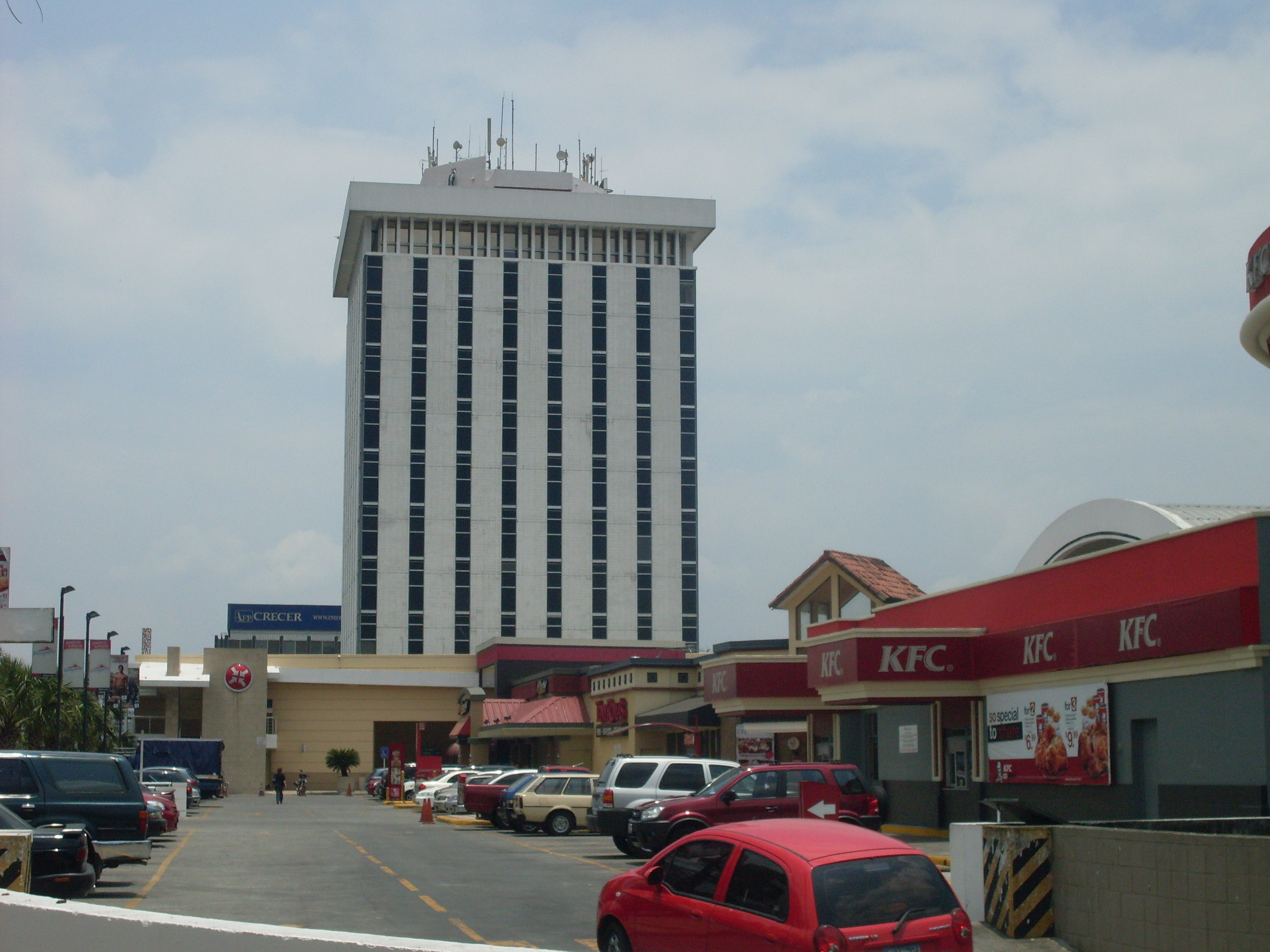 Torre Roble con 54 mt de altura